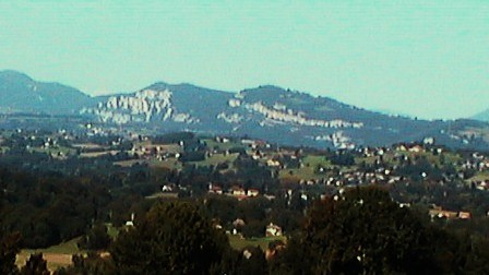 Vue sur le massif de l'Epine depuis Voissant